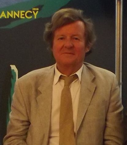 David Hare au festival international du film d'animation d'Annecy 2018